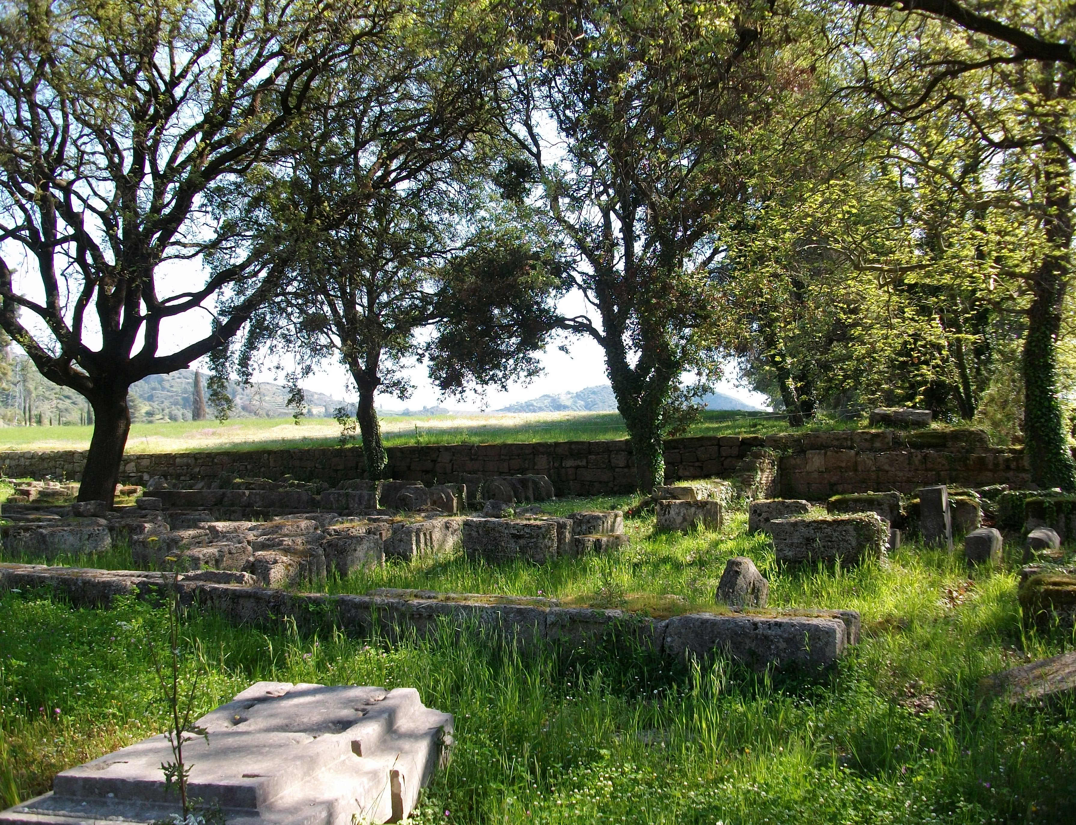 Restes de l'estoa d'Eco, Olímpia.